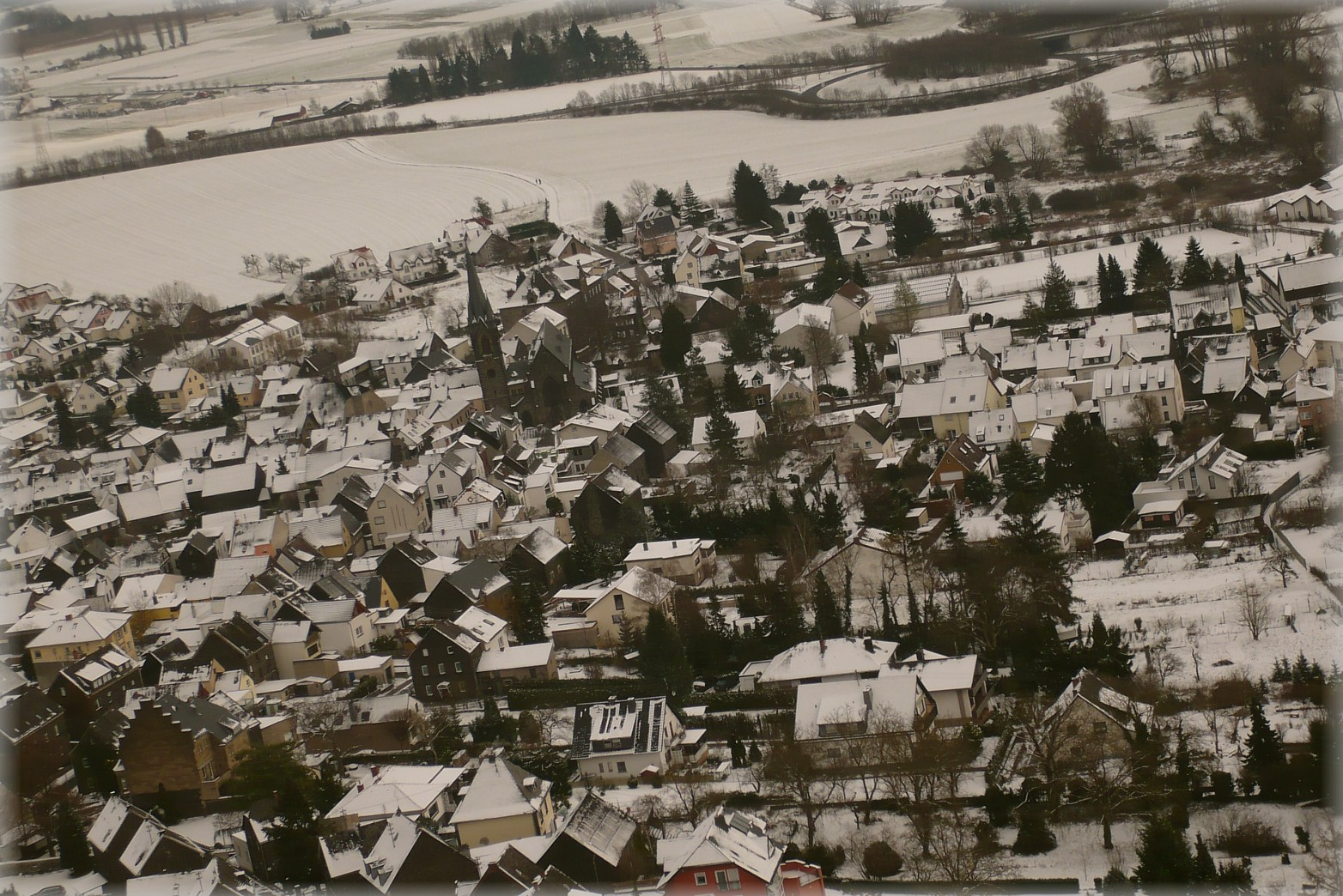 Luftaufnahme